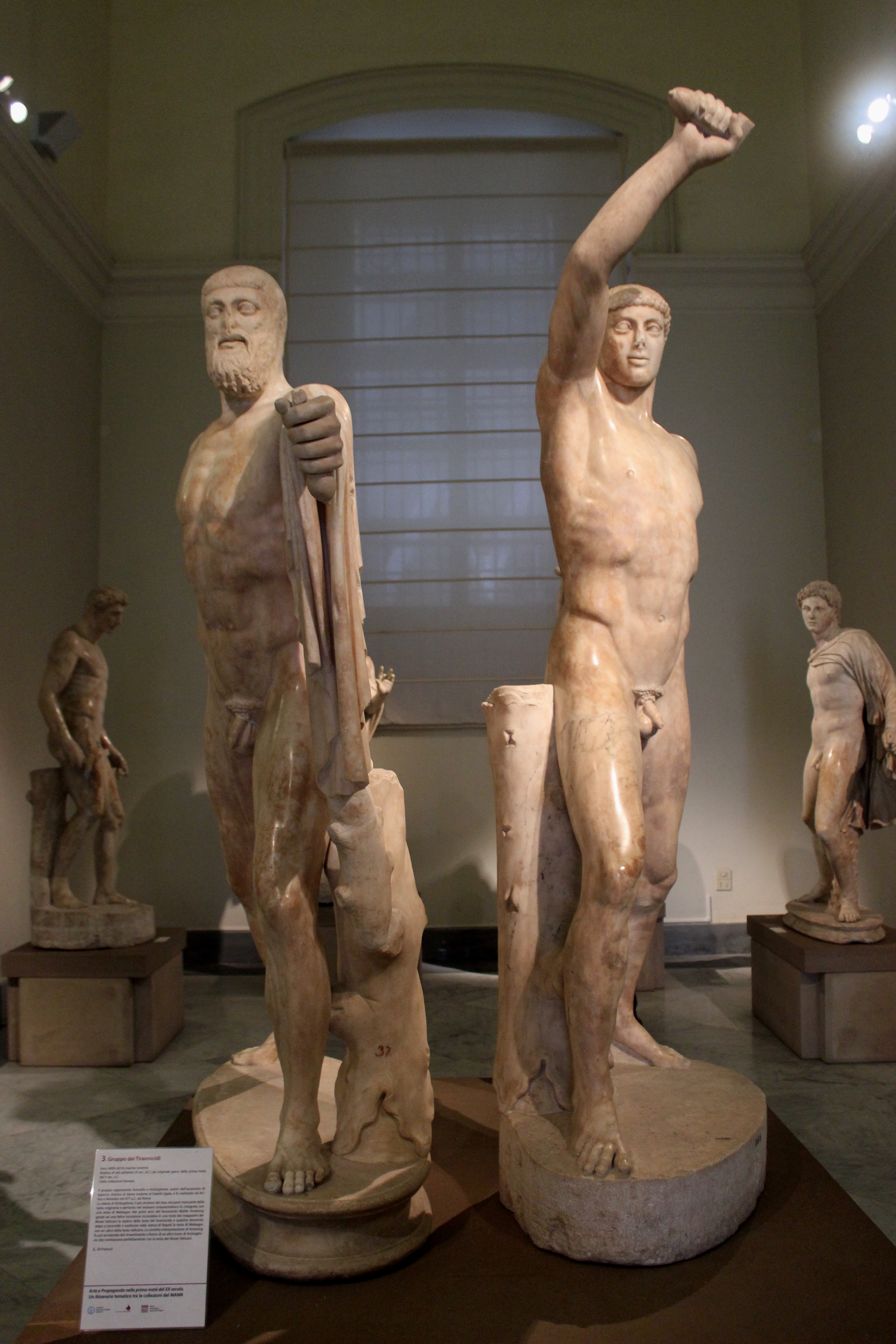 Nápoles. Museo Archeologico Nazionale. Grupo de Harmodio y Aristogiton.